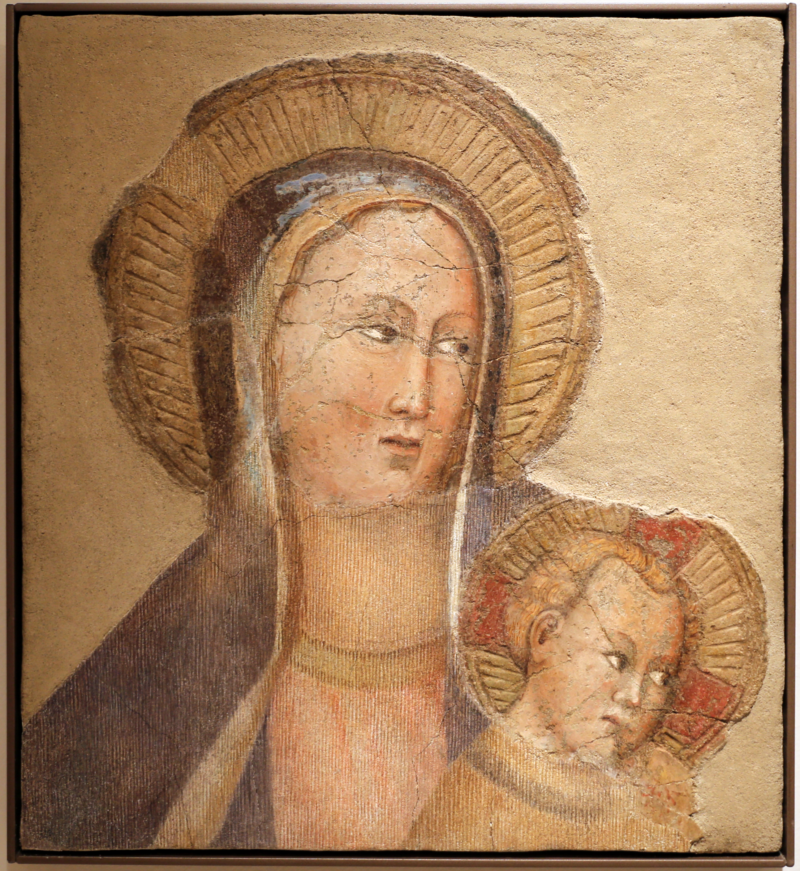 chiesa di San Giacomo Apostolo dei Domenicani This is a photo of a monument which is part of cultural heritage of Italy.